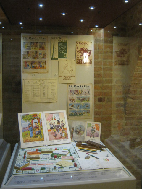 Museo del Risorgimento This is a photo of a monument which is part of cultural heritage of Italy.